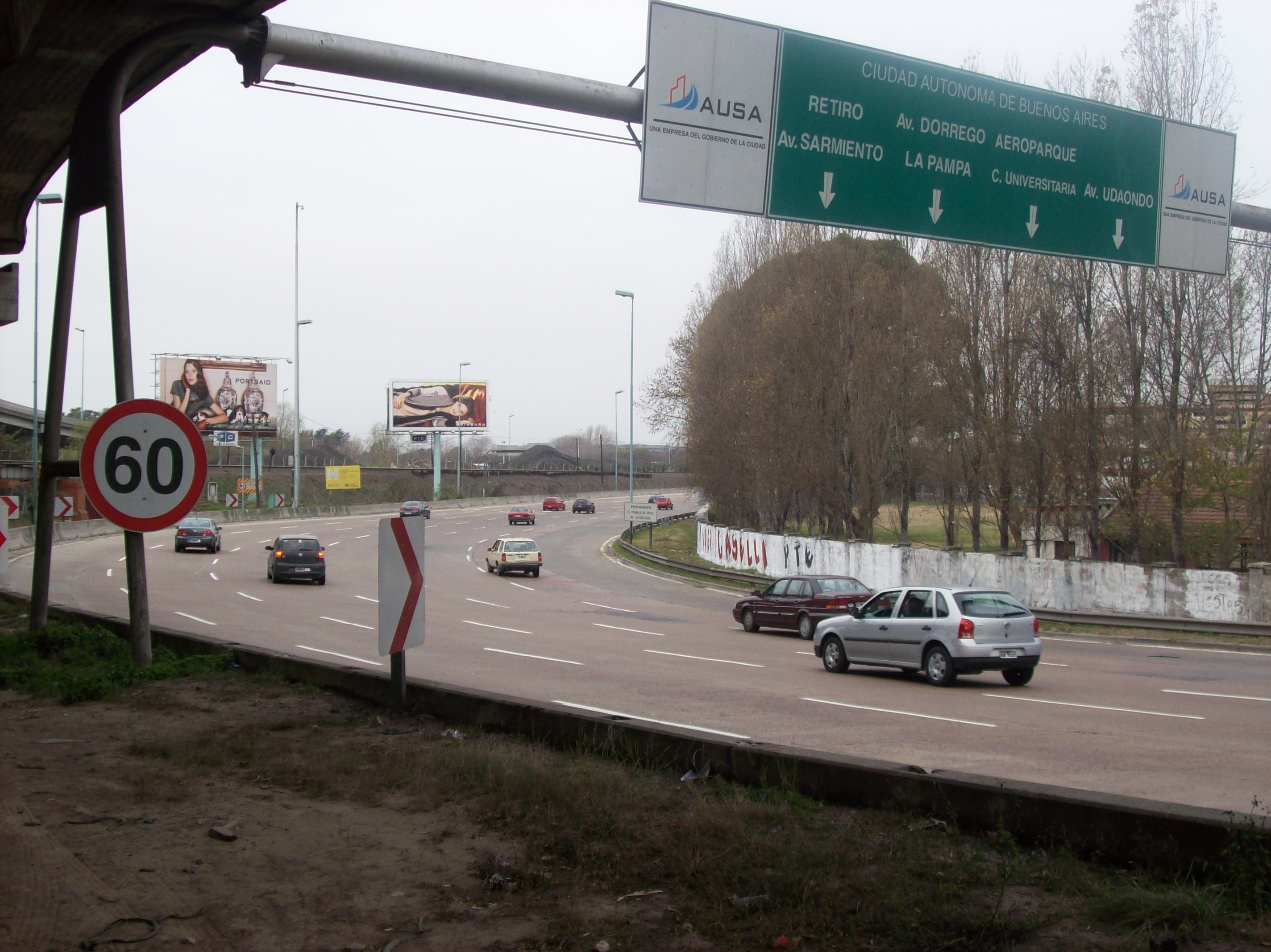 Inicio de la Avenida Lugones, en la bajada de la Avenida General Paz. Ubicado en la Ciudad de Buenos Aires, Argentina.